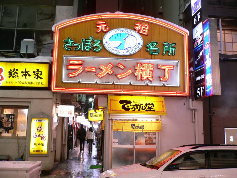 Ramen Yokocho